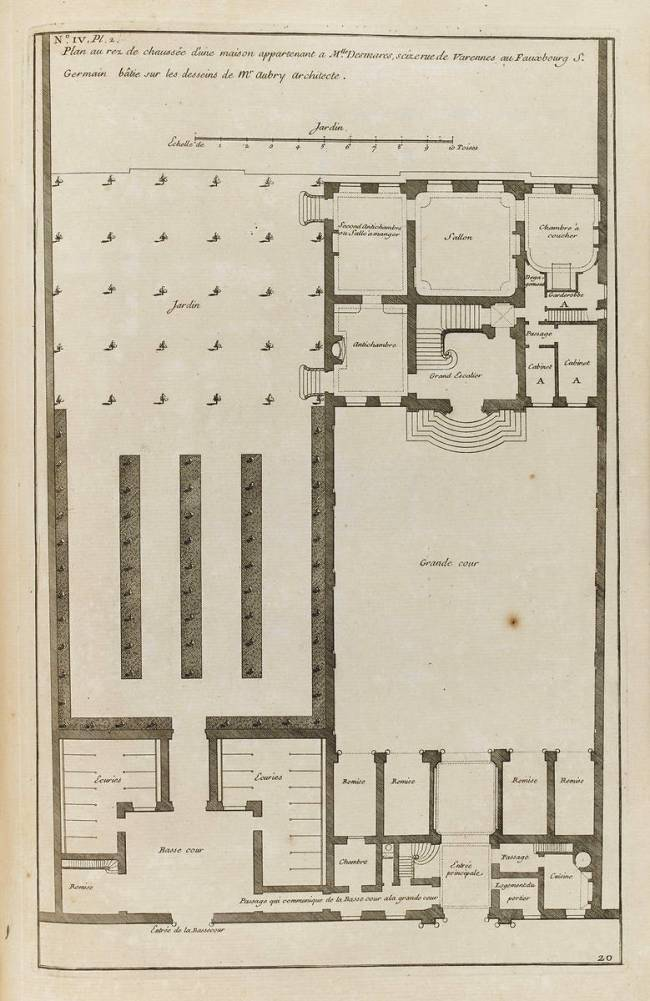 Hôtel de Villeroy - État originel